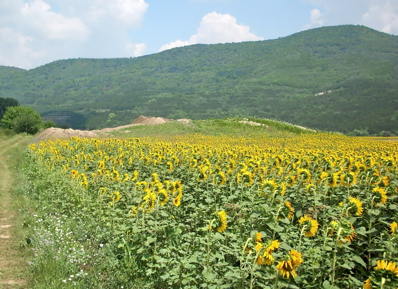 Тракийската могила при село Гагово, община Попово - общ поглед